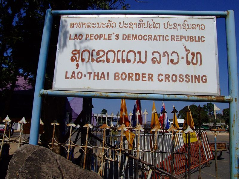 ด่านพรมแดนช่องเม็ก ฝั่งแขวงจำปาสัก ประเทศลาว หมวดหมู่:ด่านพรมแดน หมวดหมู่:ประเทศลาว